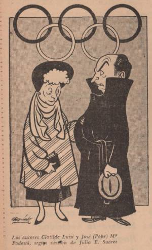 Clotilde Luisi junto a José María Podestá